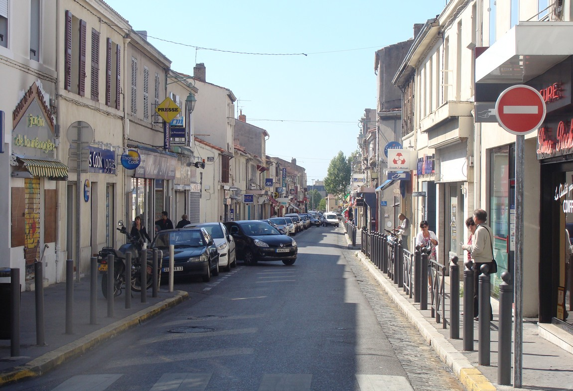 La rue Émile-Zola, dans le vieux Mazargues, vue depuis la place de l'église.